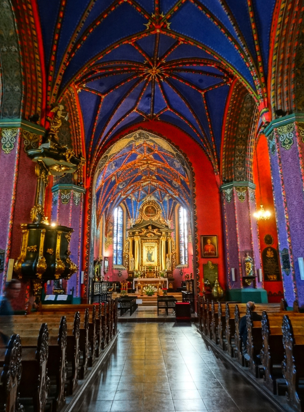 Wnętrze (nawa główna) katedry p.w. św. Marcina i Mikołaja w Bydgoszczy